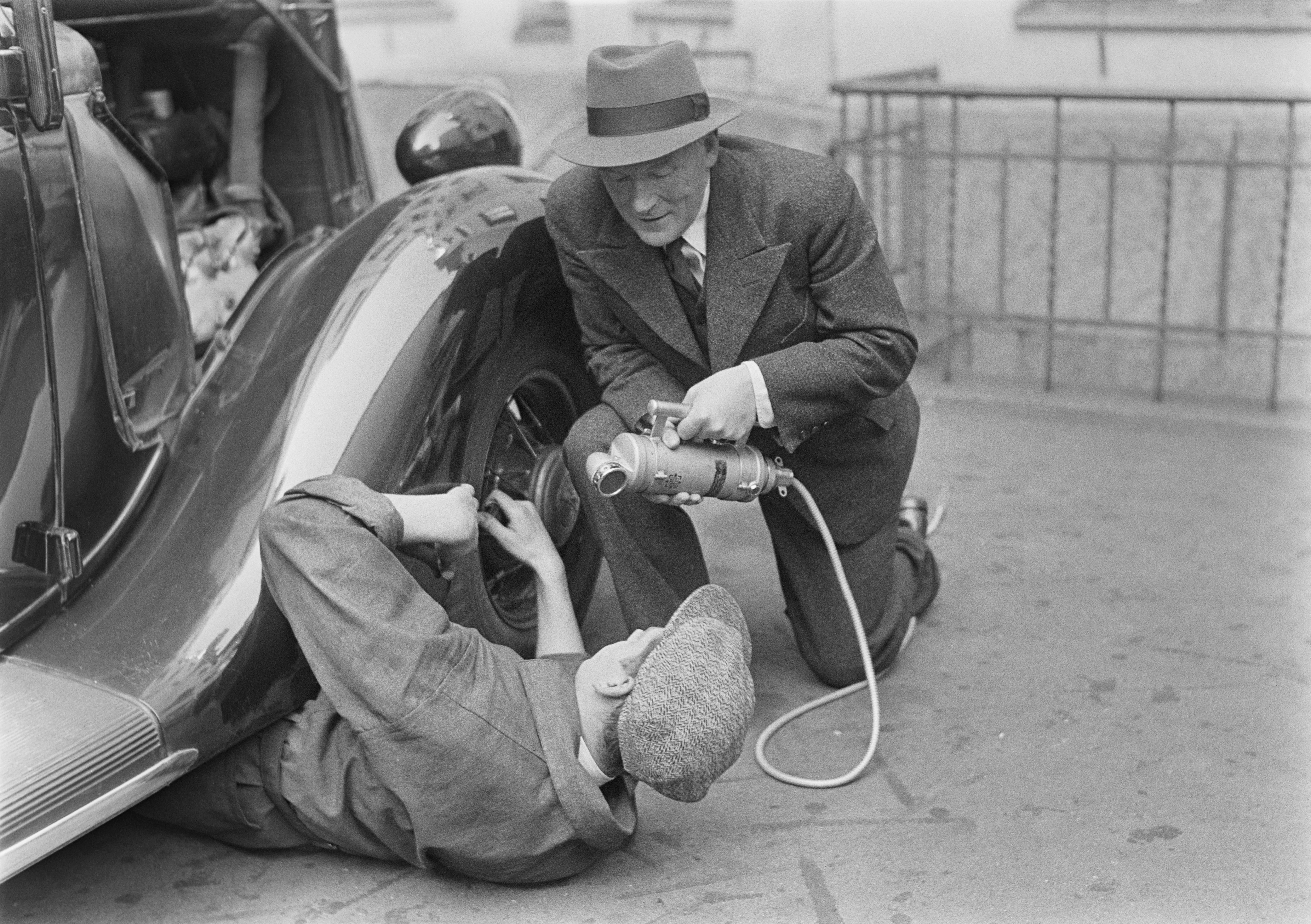 Yleisradion reportteri Alexis af Enehjelm haastattelemassa miestä, joka korjaa henkilöautoa auton alla. Enehjelm oli Yleisradion radion ensimmäinen kuuluttaja ja ohjelmanjärjestäjä 1926-1927. Vuosina 1933-1939 hän toimi apukuuluttajana, reportterina ja selostusosaston päällikkönä. Kuvausaika arvioitu vuosikymmenen tarkkuudella. Tiedätkö jotain tästä kuvasta? Jätä kommentti tai ota yhteyttä sähköpostitse: Tutustu Ylen arkistosisältöihin: Fler skatter från Yles arkiv: More about Yle, the Finnish Broadcasting Company